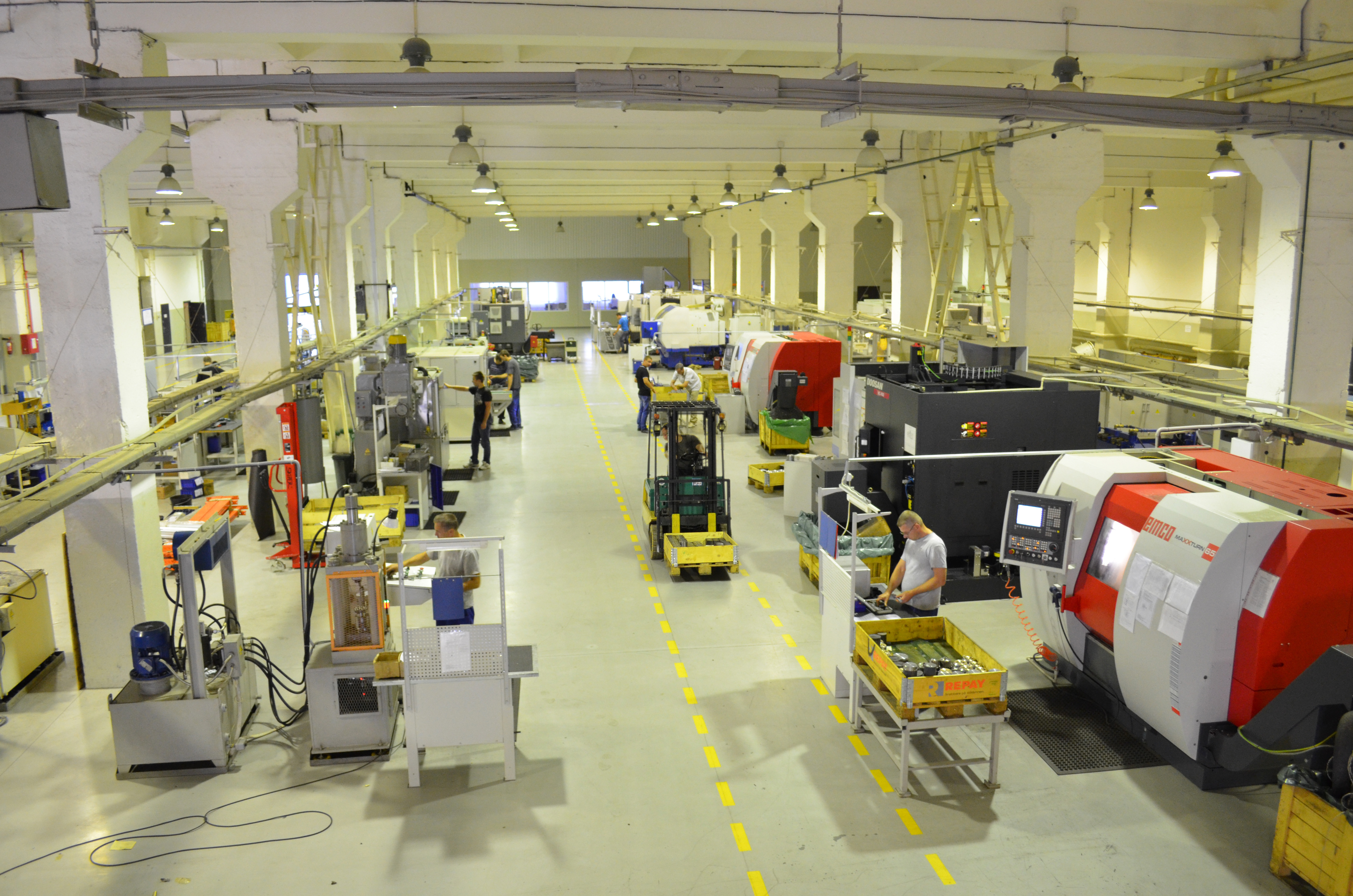 фото виробництва "Гідросила"